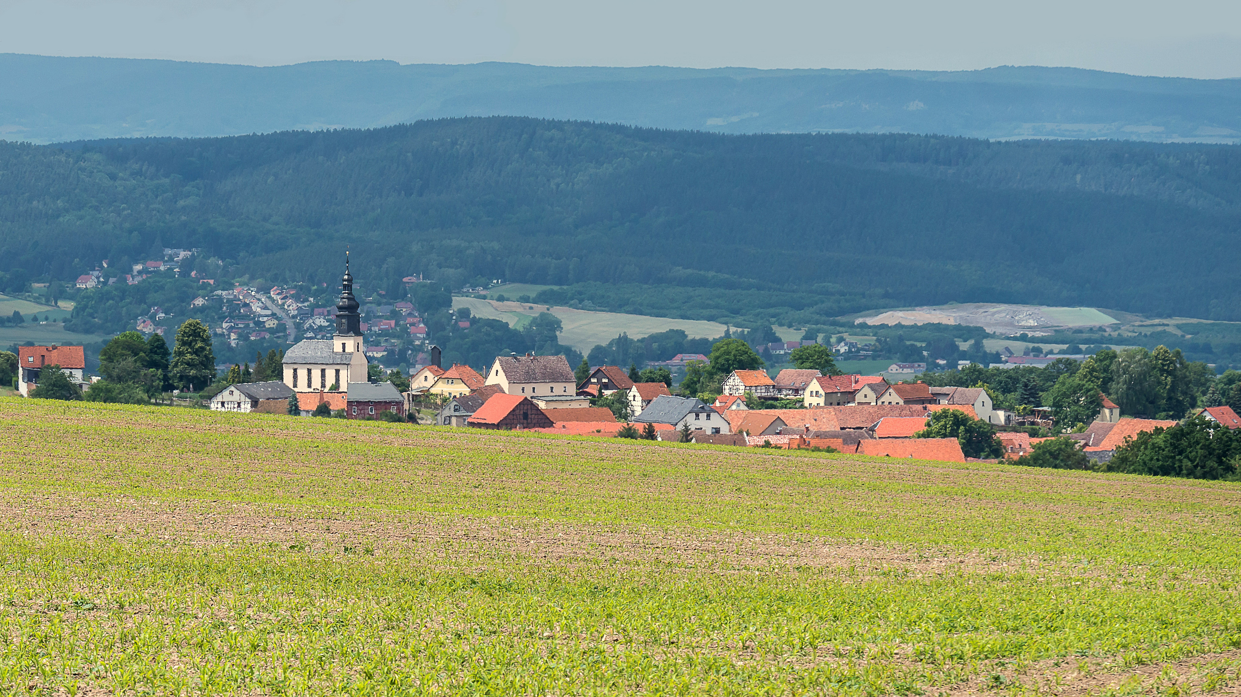 Gertewitz Ortslage